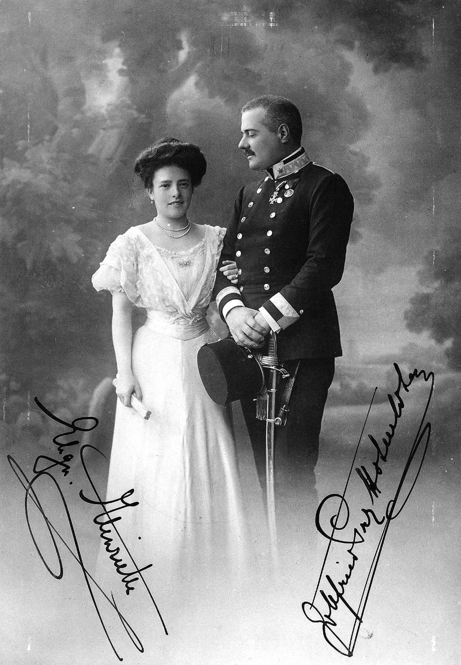 Gottfried Prinz zu Hohenlohe-Waldenburg-Schillingsfürst (1867-1932) und seine Frau Maria Henriette, Erzherzogin von Österreich (1883-1956)Depicted people: Archduchess Maria Henrietta of Austria and Prince Gottfried of Hohenlohe-Schillingsfürst